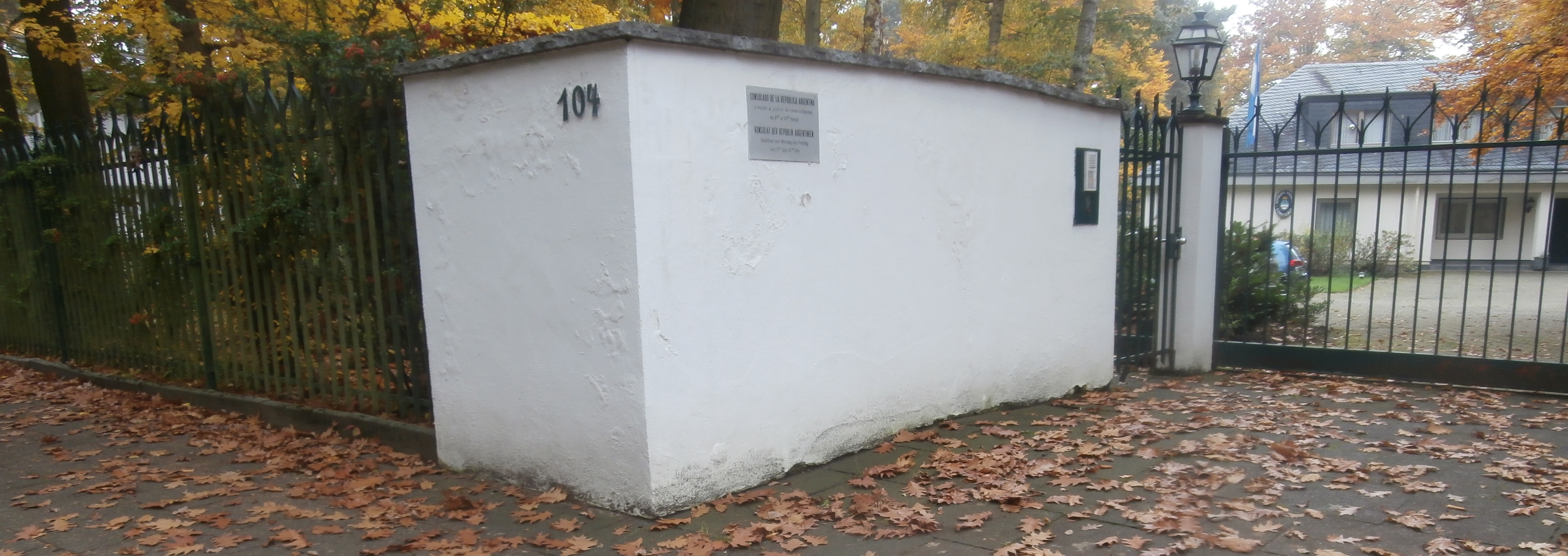 Konsulat der Republik Argentinien, Robert-Koch-Straße 104, Bonn-Venusberg